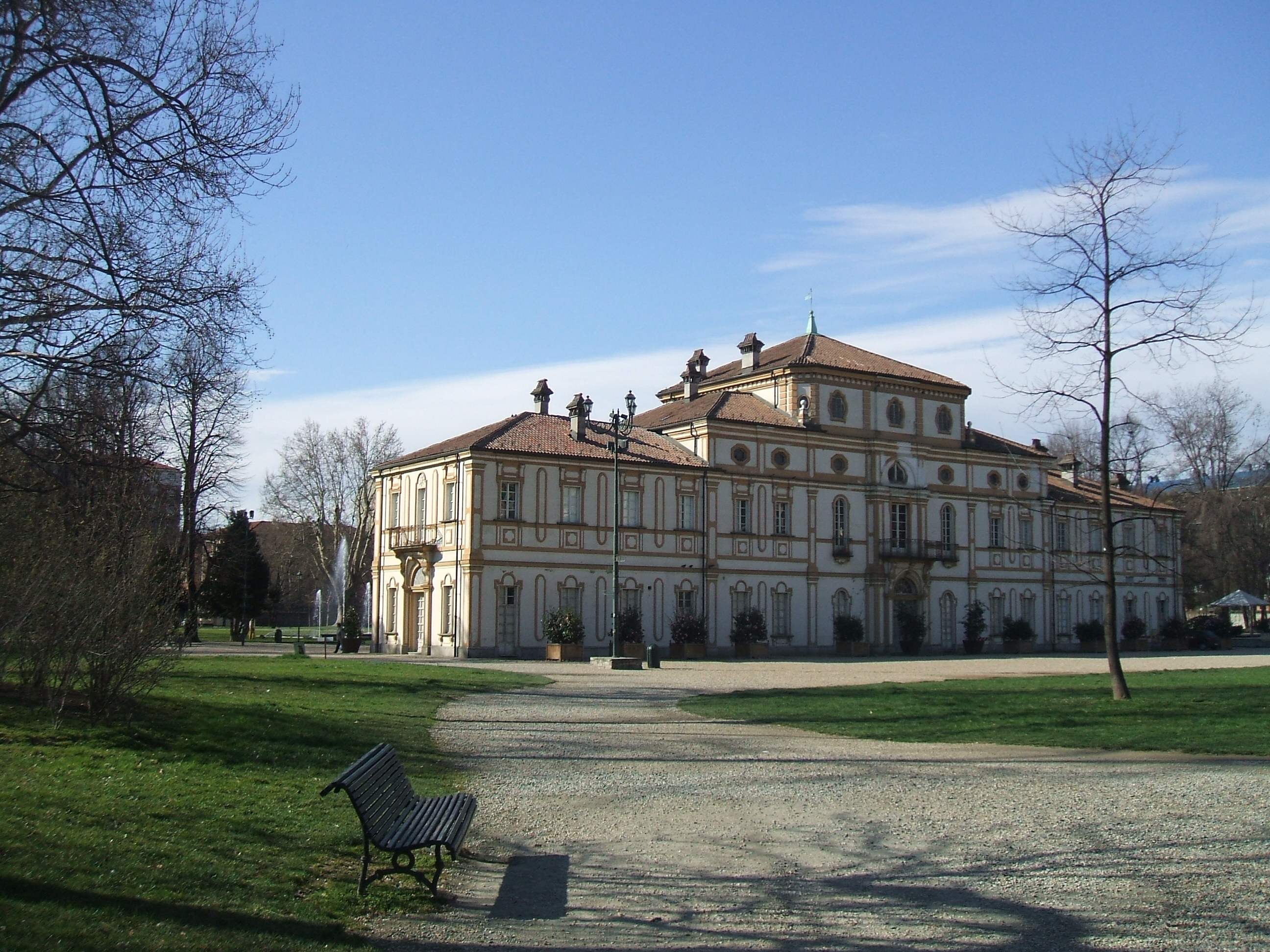 Villa La Tesoriera, Torino, veduta della facciata secondaria